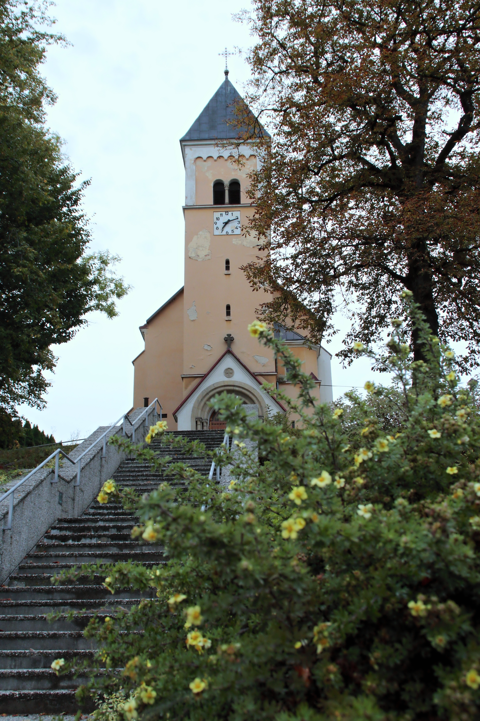 Kostel sv. Jana Křtitele v Životicích u Nového Jičína.